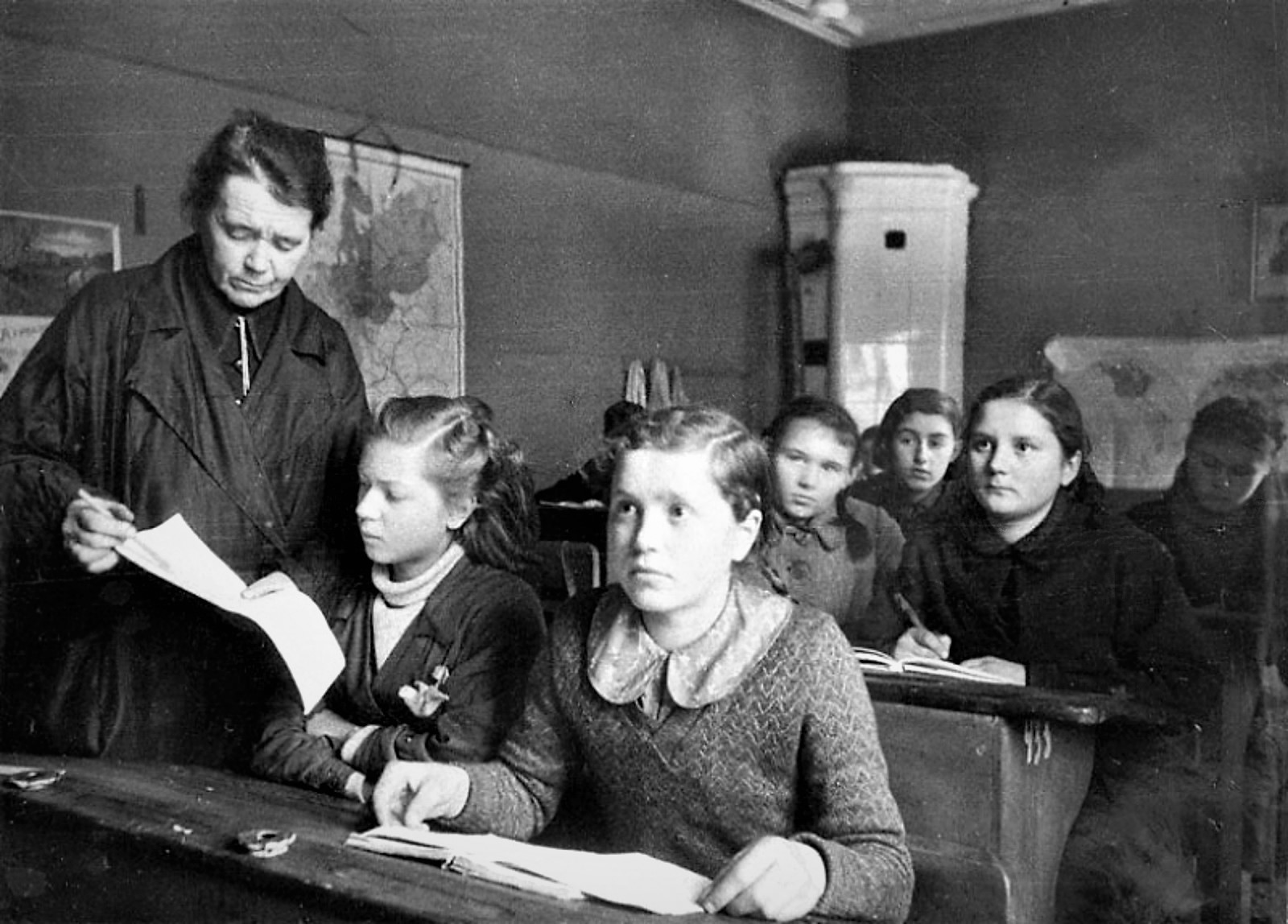 Учительница Е.М. Демина ведет урок в 7-м классе средней школы № 10 Свердловского района Ленинграда. На первом плане – ученицы Оля Руран и Зоя Чубаркова